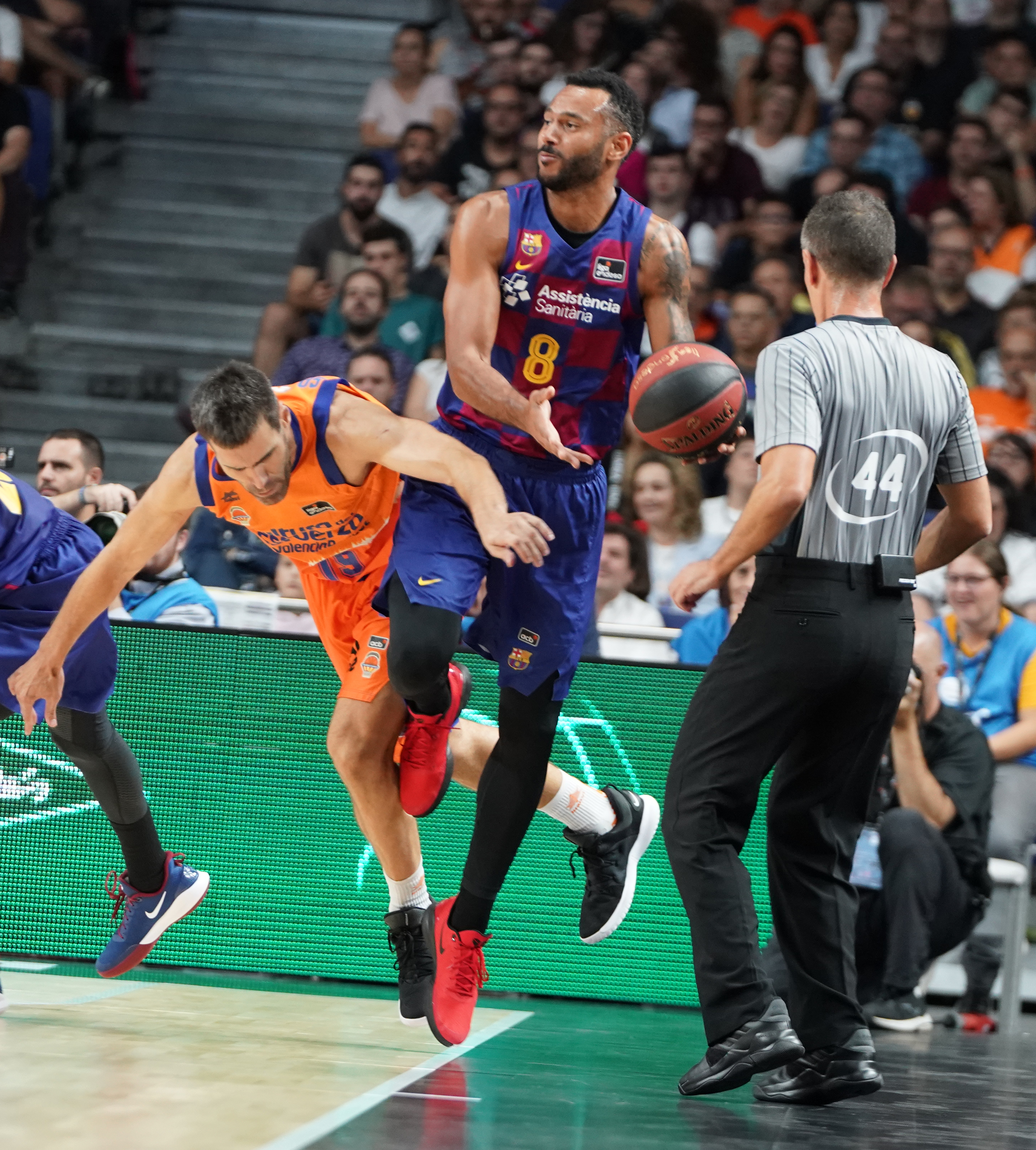 Adam Hanga